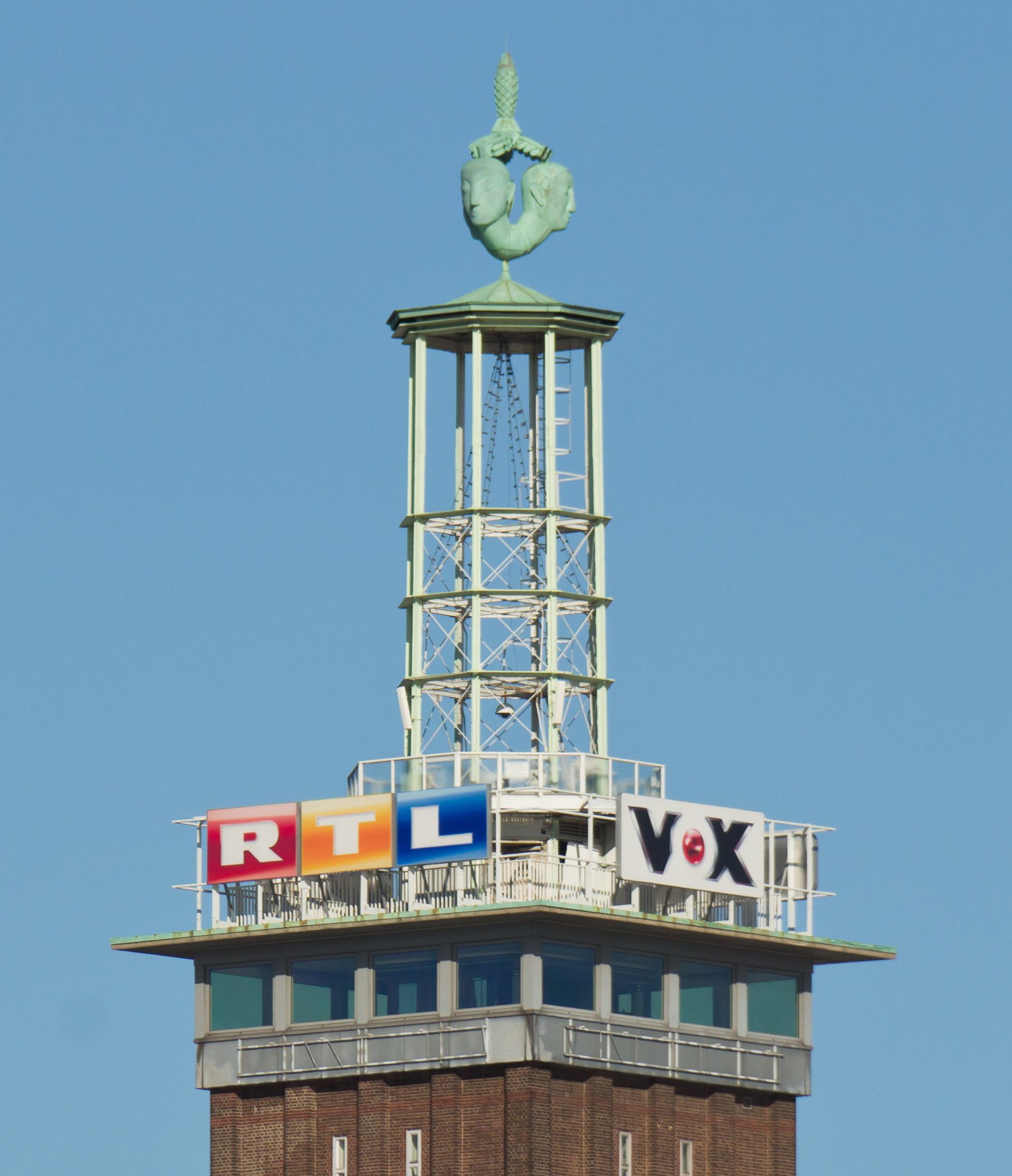 Denkmalgeschützter Messeturm, Teil der Rheinhallen. Mit Werbung für die Fernsehsender RTL und VOX der RTL-Gruppe, seit diese im nördlichen Teil der Rheinhallen ihren Sitz haben